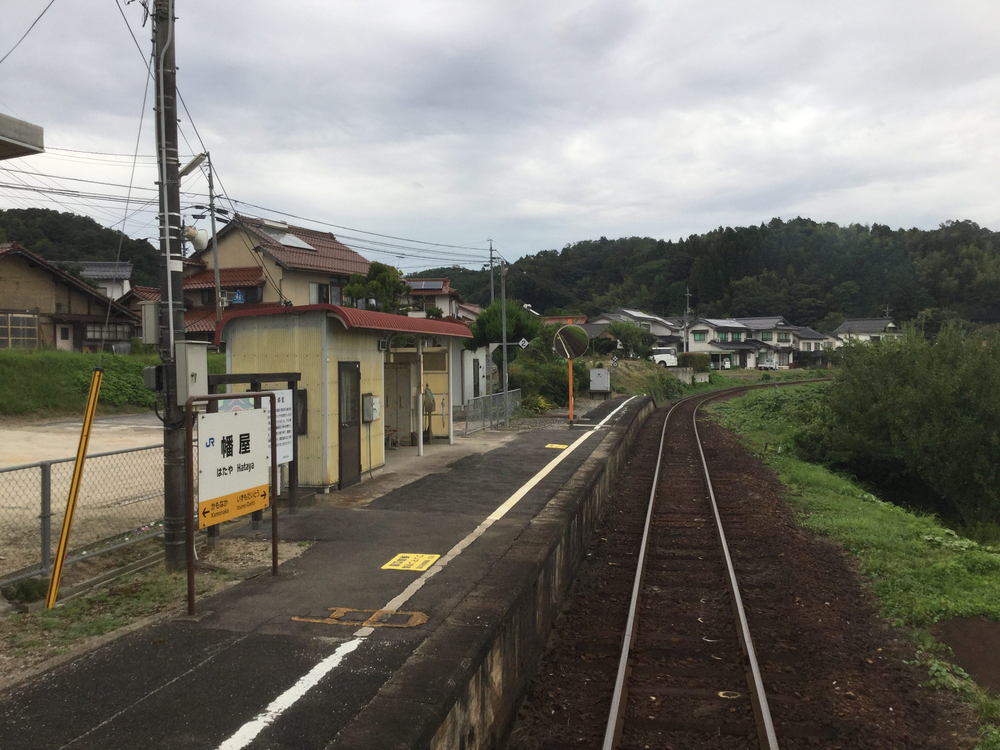 Hataya Station (幡屋駅)